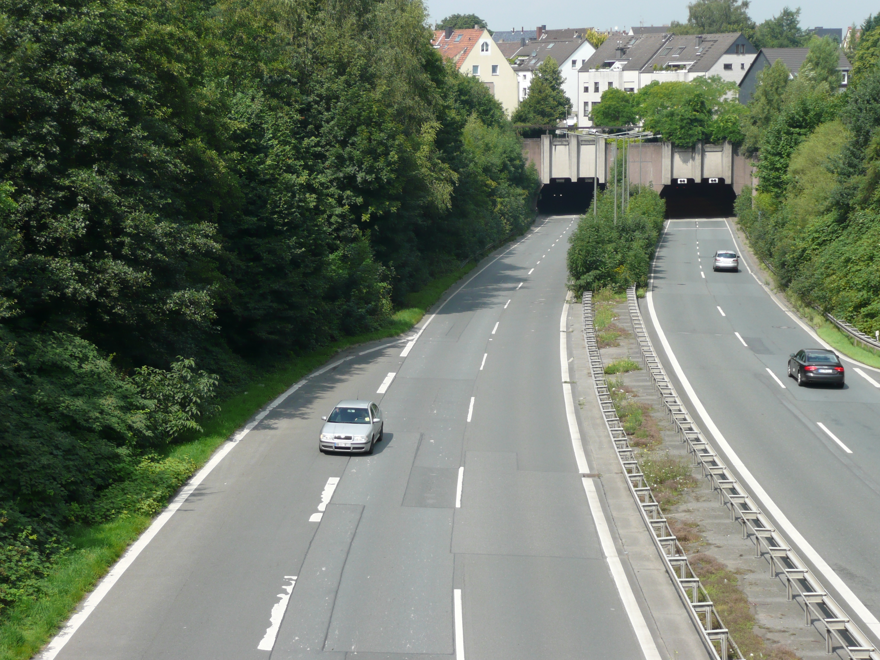 Bochum Stadtautobahn